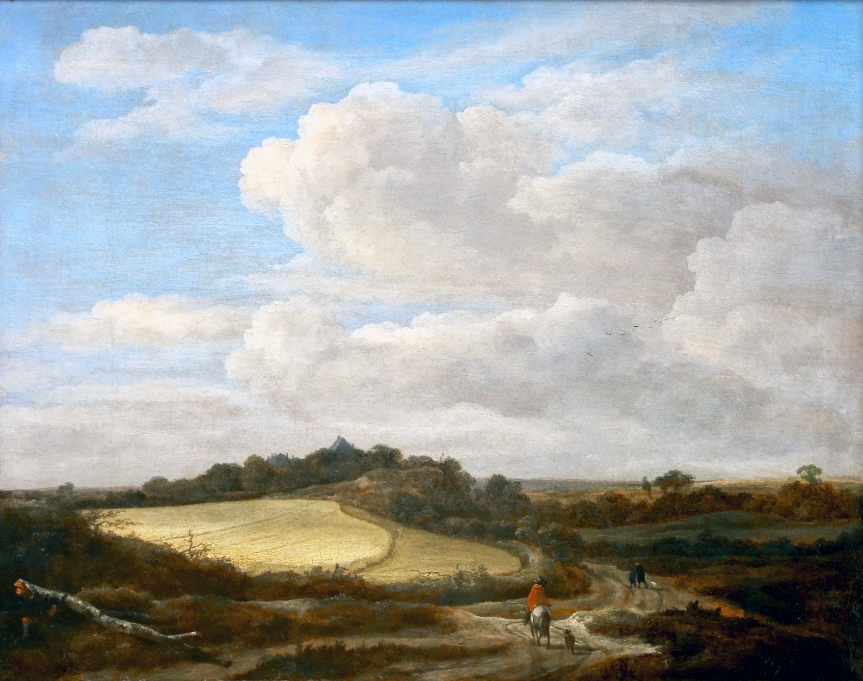 Le champ de blé au Palais des beaux-arts de Lille. Joconde database: entry 000PE017166